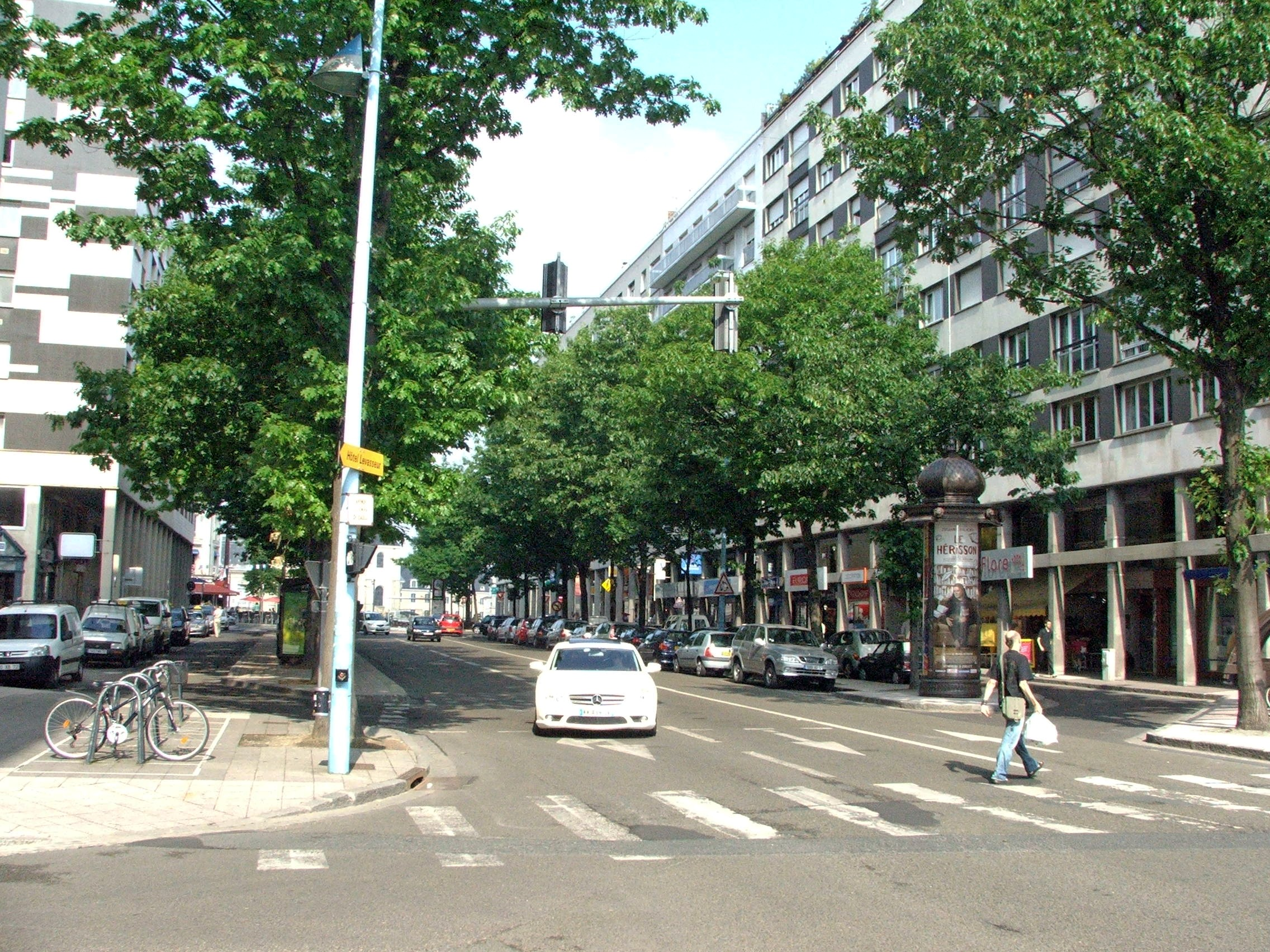 L'avenue du général de Gaulle au Mans, permettant de faire joindre la place de la république et l'avenue Bollée, axe majeur à l'est de la ville.